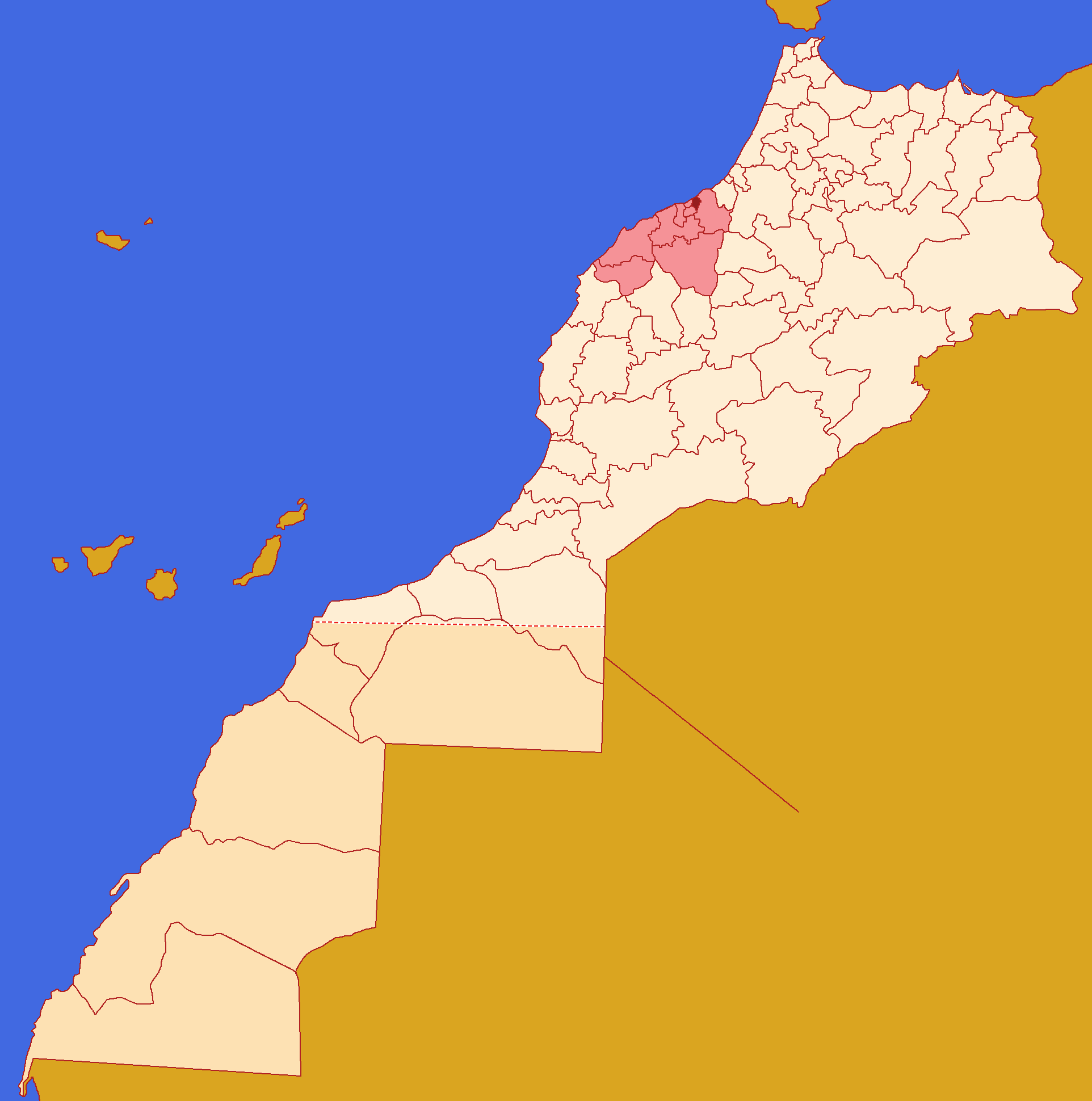 Localização da prefeitura de Mohammedia, incluida na região de Casablanca-Settat, incluida em Marrocos.Conforme a reforma administrativa de 2015.